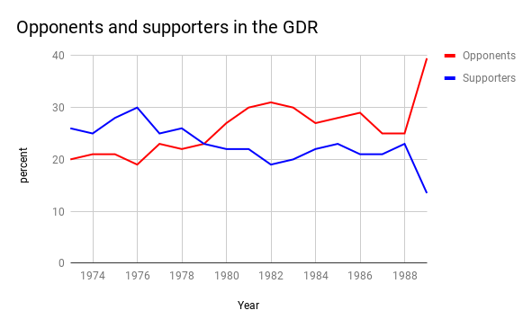 The diagram shows the percentage of supporters and opponents in the GDR 1973-1989